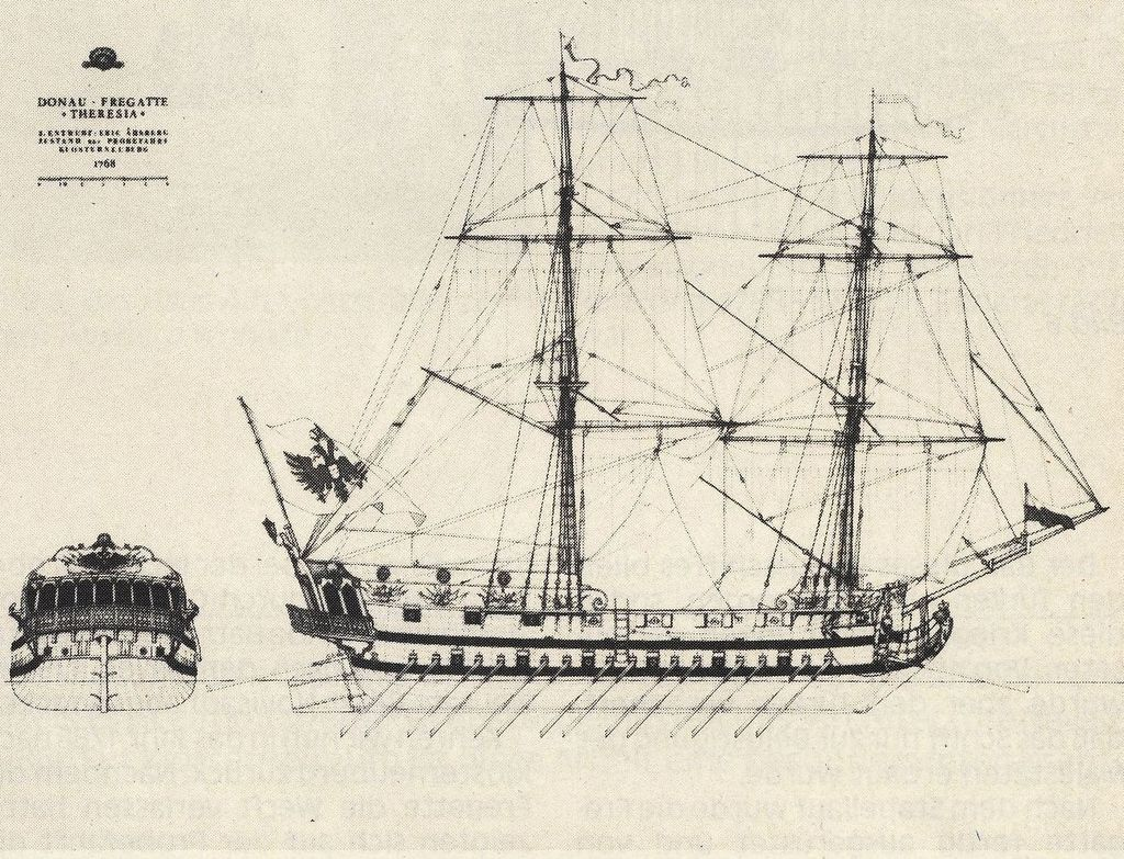 Vorder- & Seitenansicht der Donaufregatte Theresia